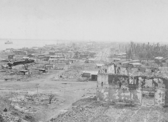 Aftermath of the Great Fire of Guayaquil in 1896